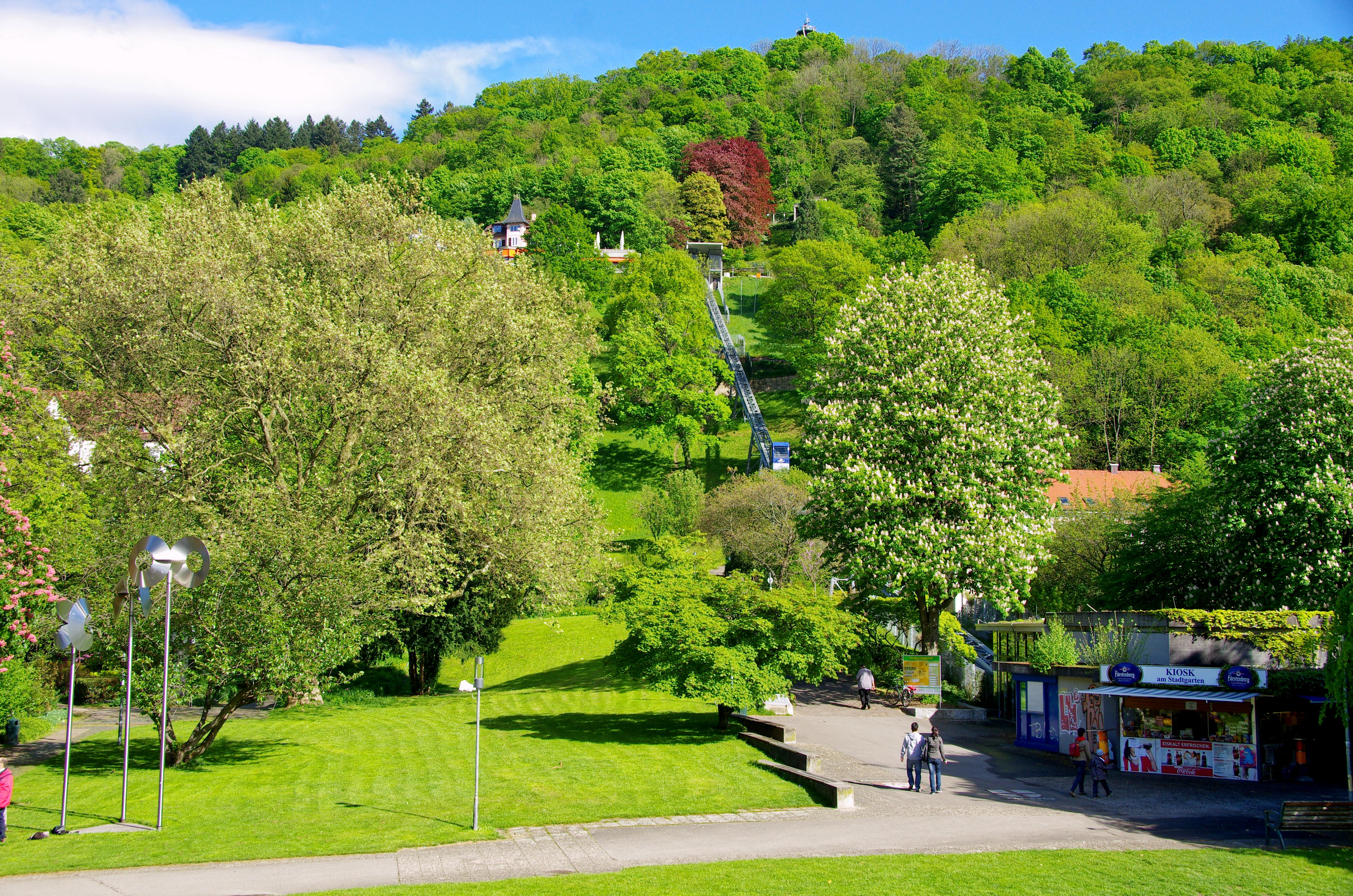 Blick vom Karlsteg in den Stadtgarten mit der Schloßbergbahn und der Bergstation Gasthof Dattler